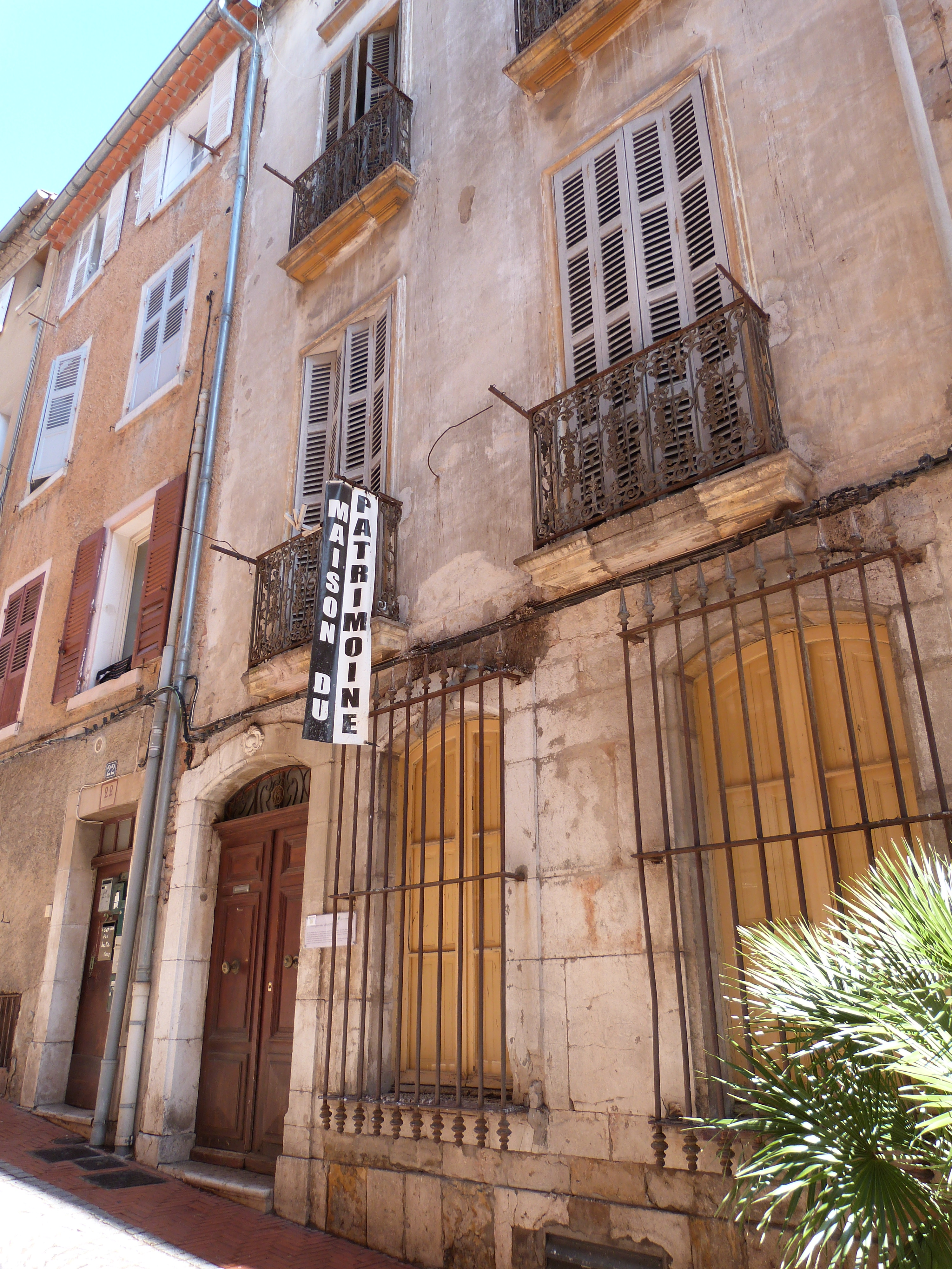 Maison à Ollioules (Var, Provence, France).